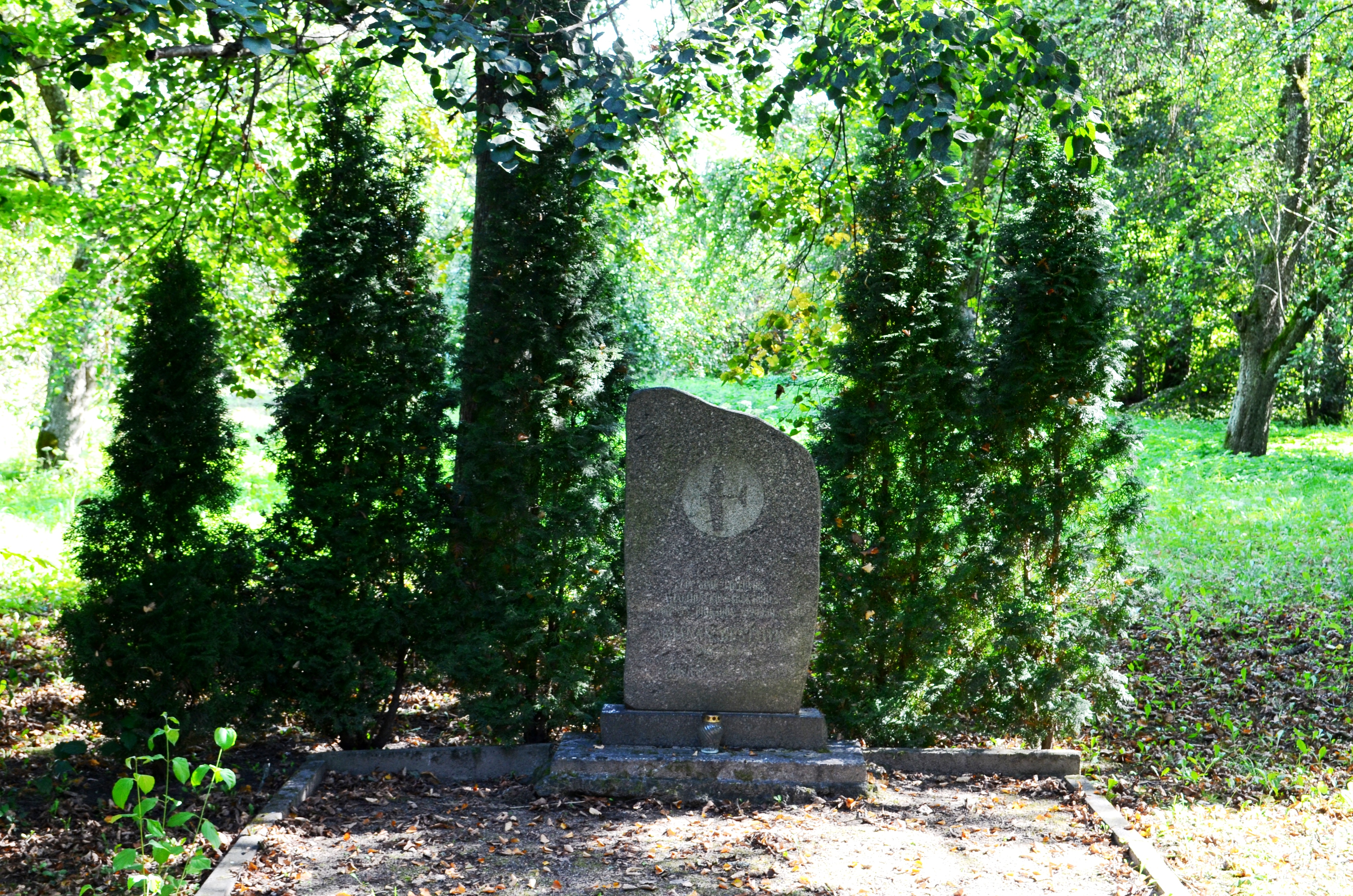 A. Gustaičio sodybvietė, Obelinė, Sasnavos sen., Marijampolės sav.